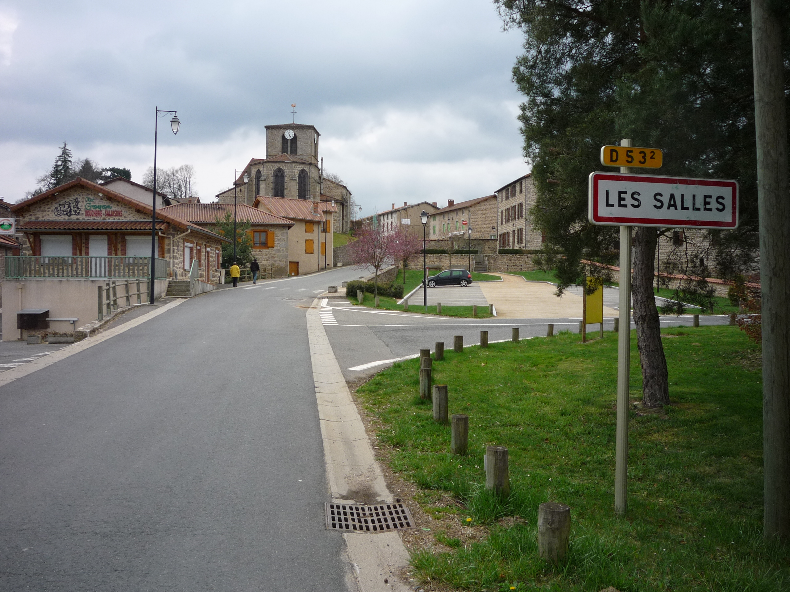 Les Salles- Entrée du bourg